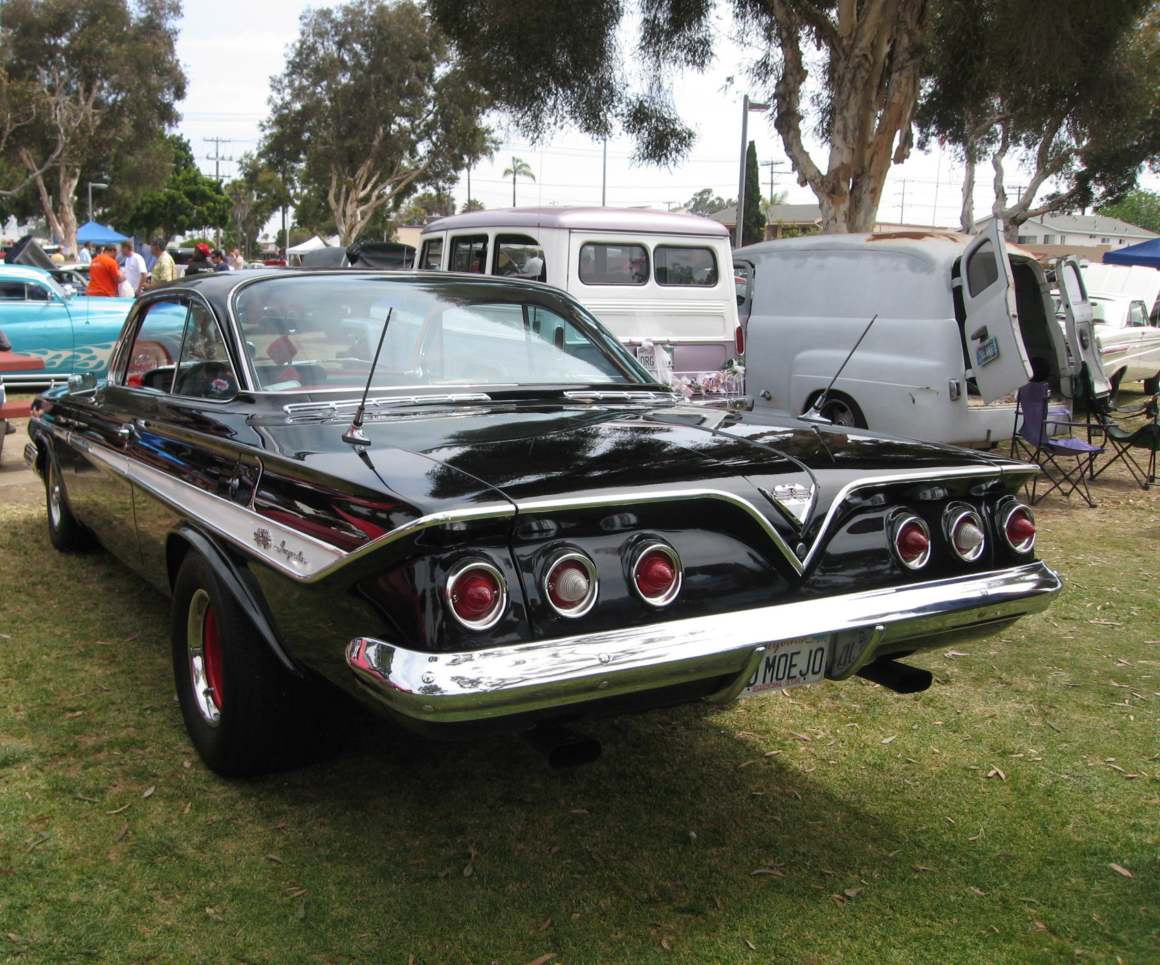 1961 Chevrolet Impala SS, San Diego, CA